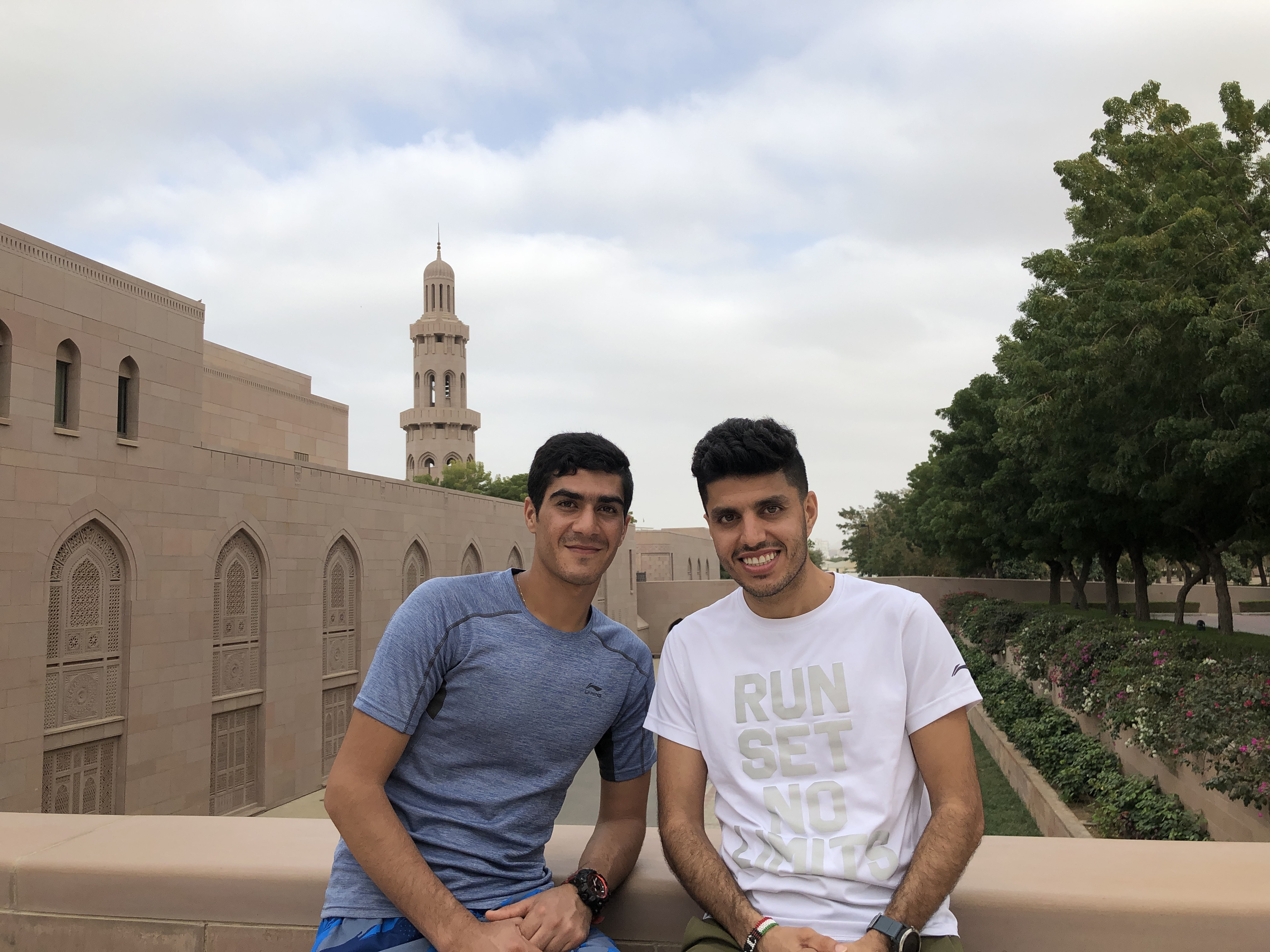 محمد باقری تاج امیر رکورددار دوی نیمه استقامت ایران در کنار جعفر مرادی رکورد دار ماراتن ایران در کنار مسجد جامع سلطان قابوس، مسقط، عمان بعد از حضور در ماراتن مسقط زمستان سال ۱۳۹۷ (۲۰۱۹)